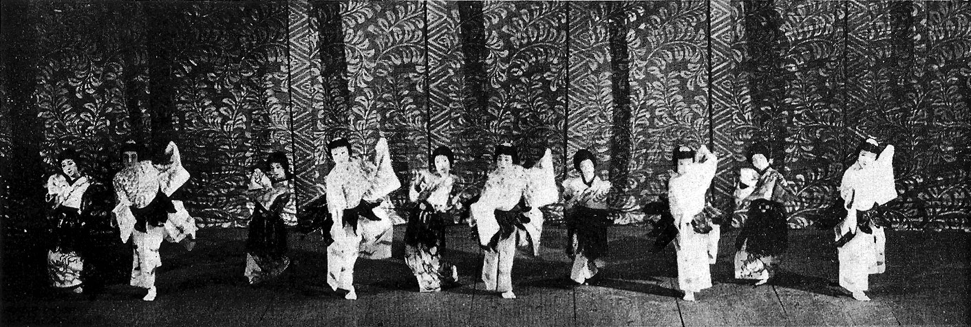 大阪松竹座にて、松竹楽劇部（後のOSK）による「寿のおどり」第四『几帳』の場面